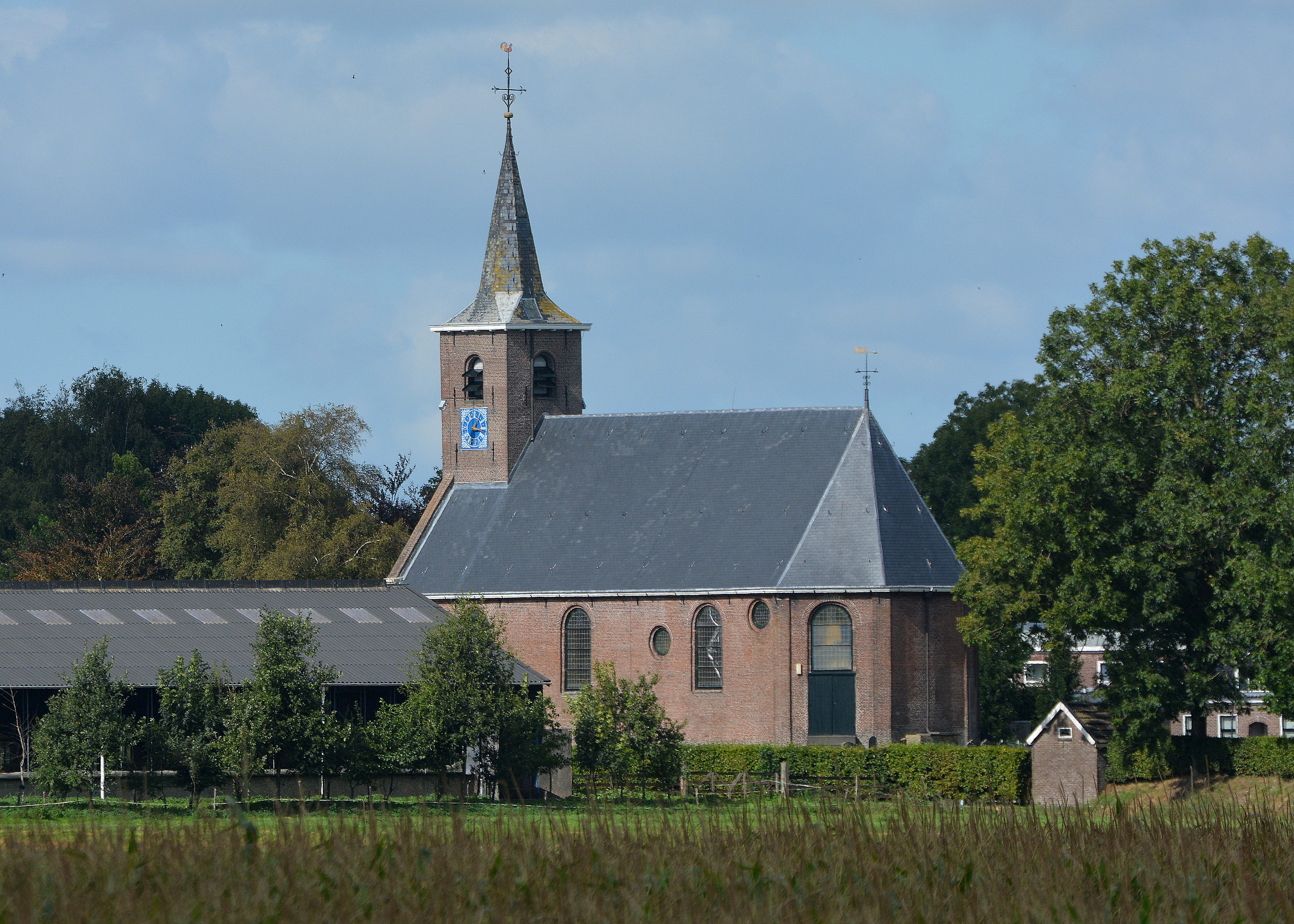 Protestantse kerk van Rijperkerk